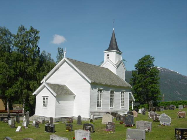 Rauma and the Øverdalen kapell